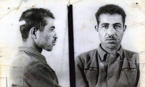 الشهيد أحمد بن درميع المدعو احمد لمطروش